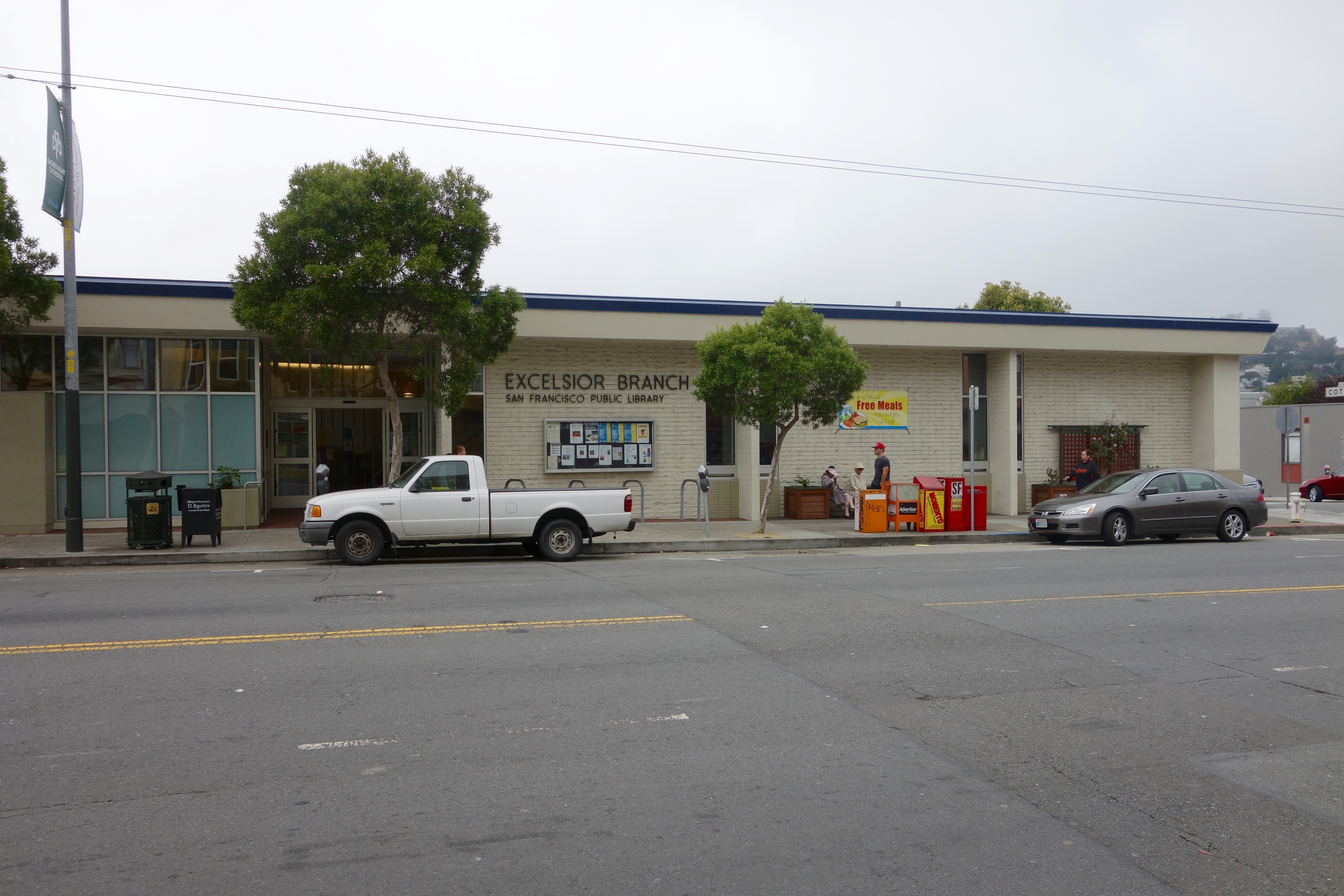 Excelsior Branch